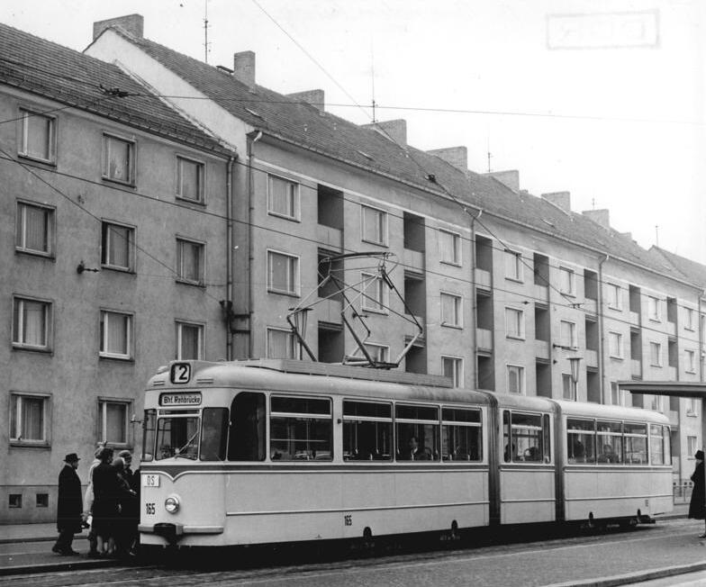 Zentralbild-Junge hsch 7.4.65 DDR, Bezirkshauptstadt Potsdam Hauptknotenpunkt aller in Potsdam befindlichen Strassen ist der Platz der Einheit. Unser Foto zeigt Neubauten am Platz der Einheit.